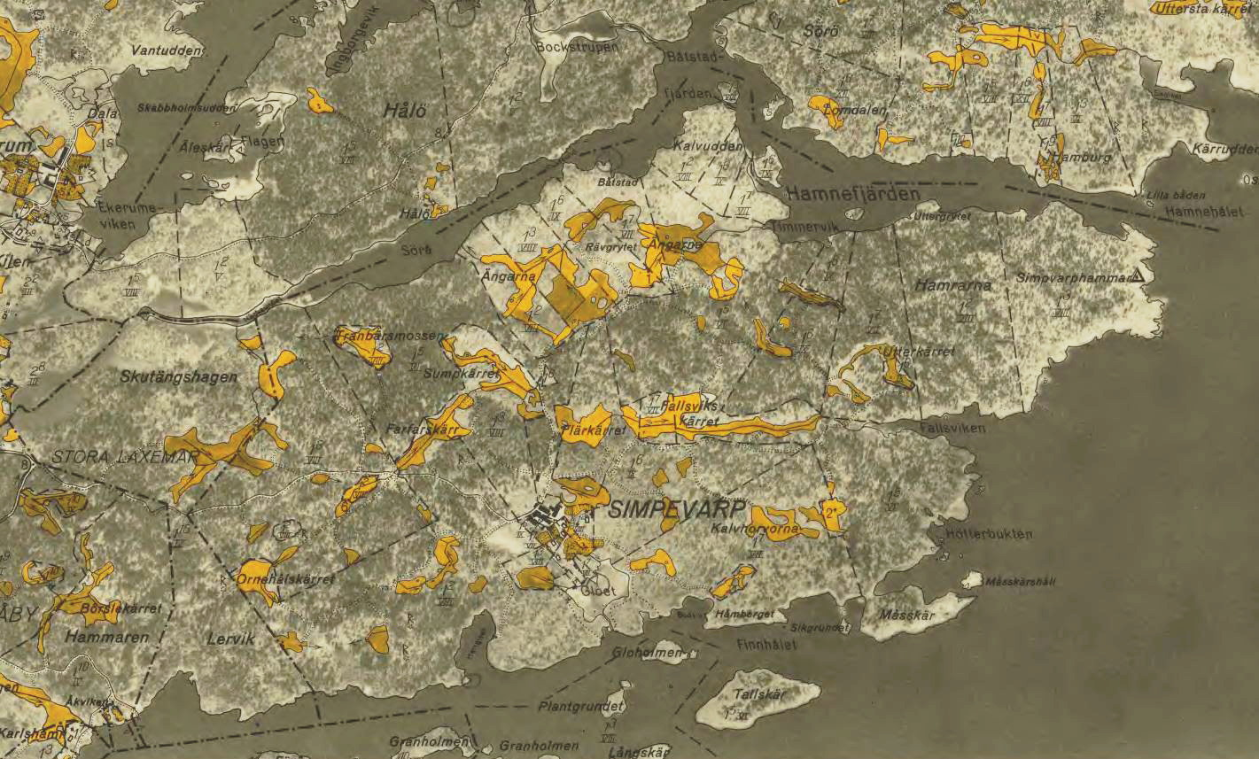 Simpevarpshalvön